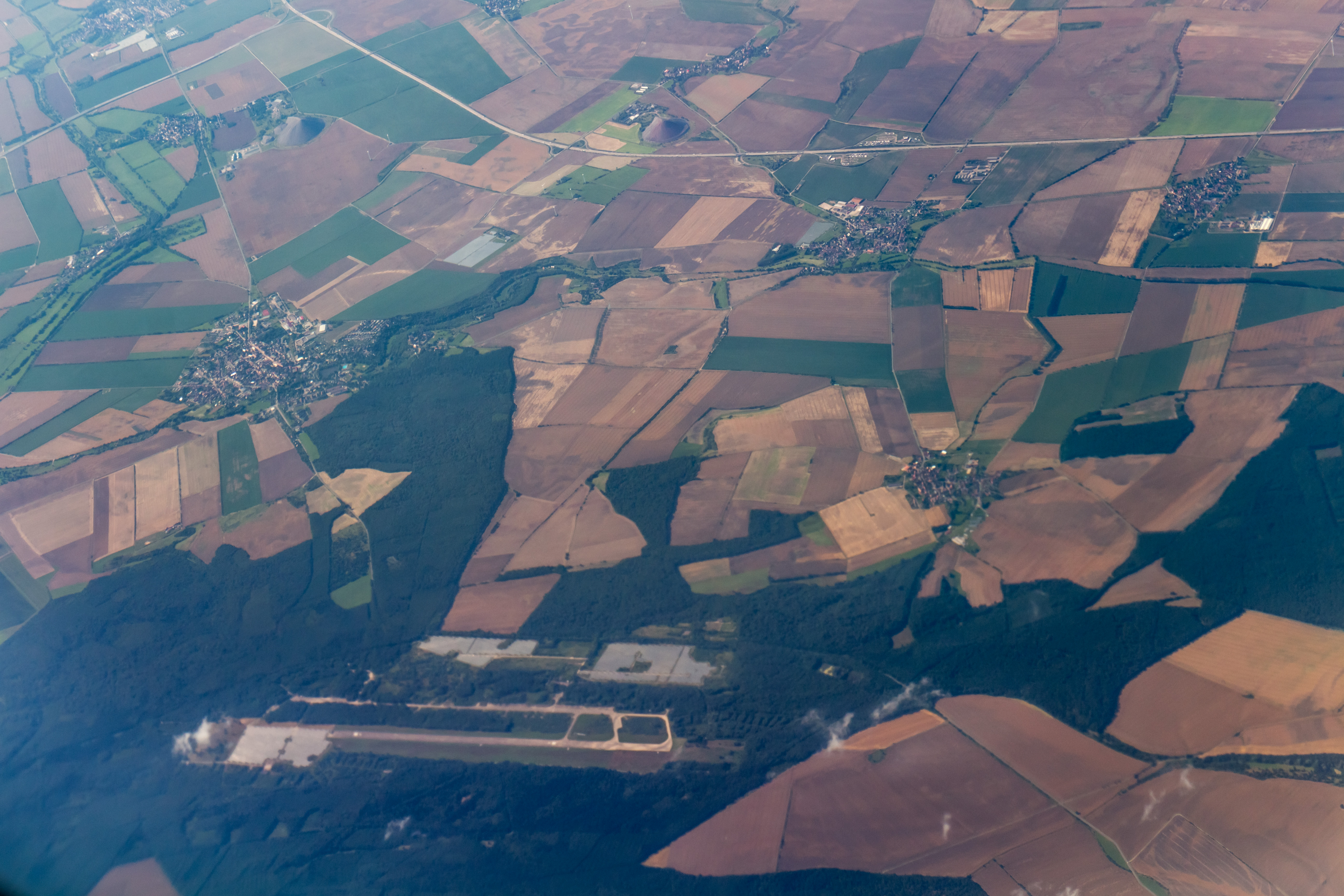 Flugplatz Allstedt